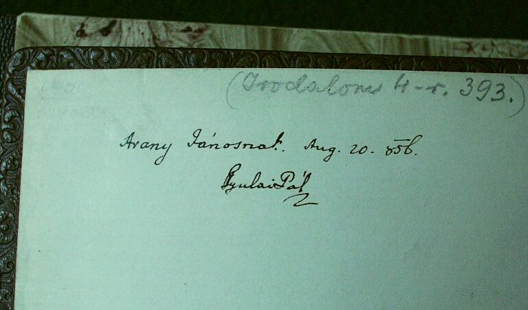 Arany János Kapcsos könyvének fotója az MTA Könyvtárának kézirattárában, Gyulai Pál bejegyzése